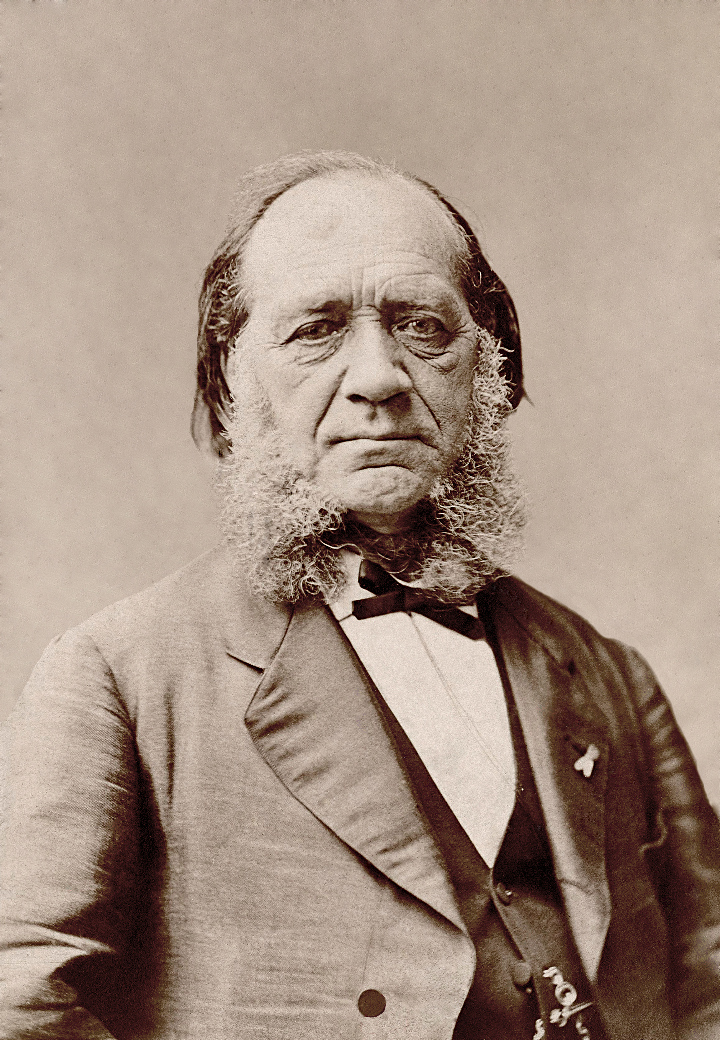 Louis-François Breguet (1804 - 1883), horloger et physicien français